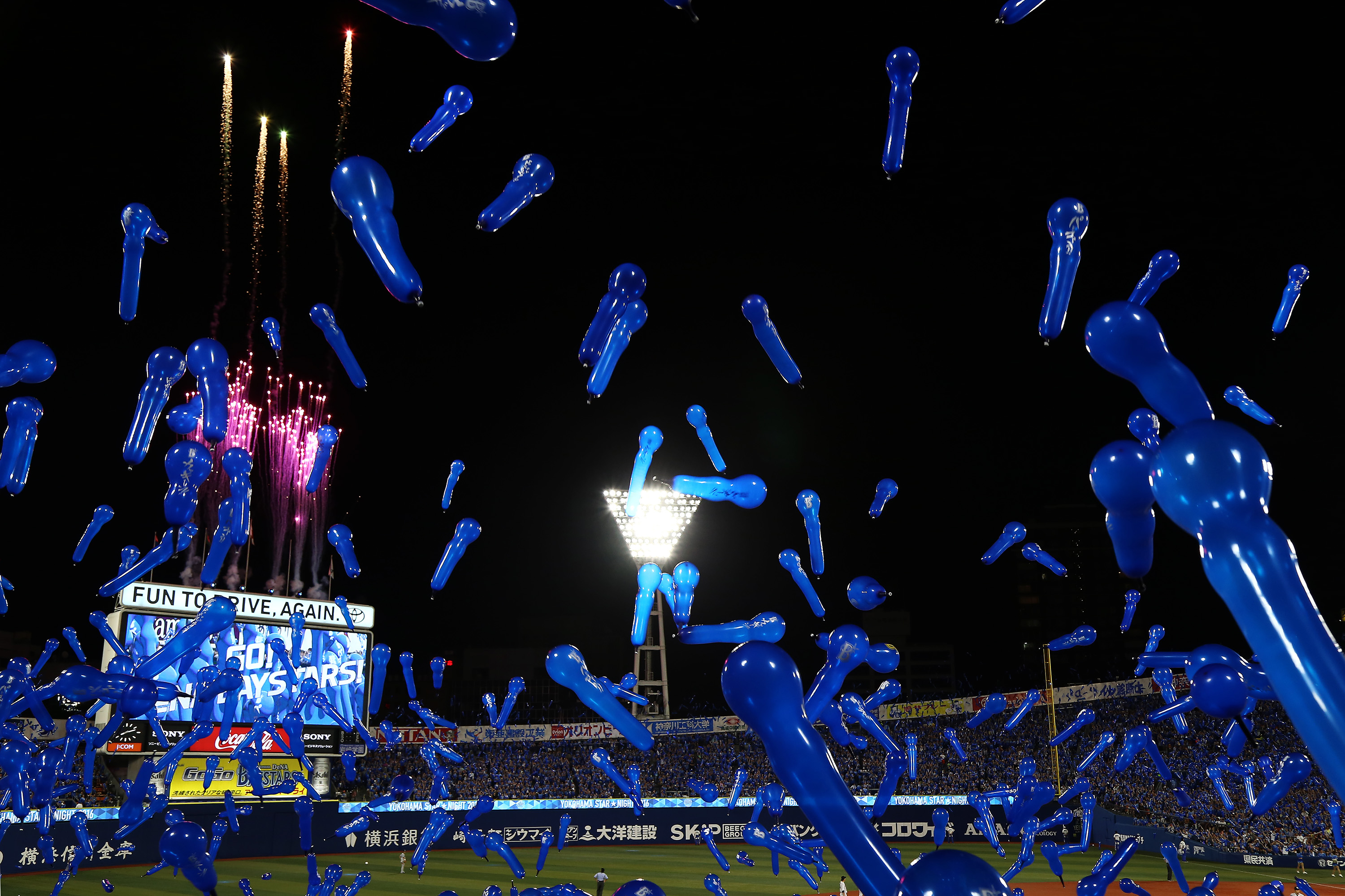 2016.8.6 Yokohama Stadium Yokohama STAR☆NIGHT Yokohama DeNA BayStars vs Chunichi Dragons [IMG_8021ks]